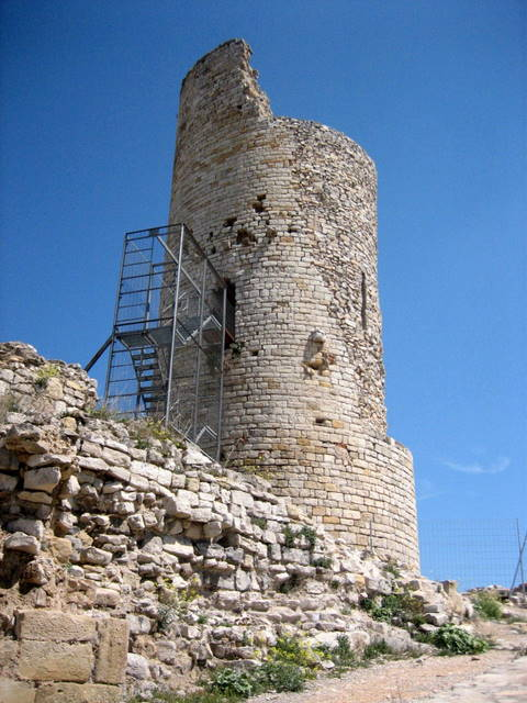 Castell de Guimerà a la comarca de l'Urgell - Catalunya